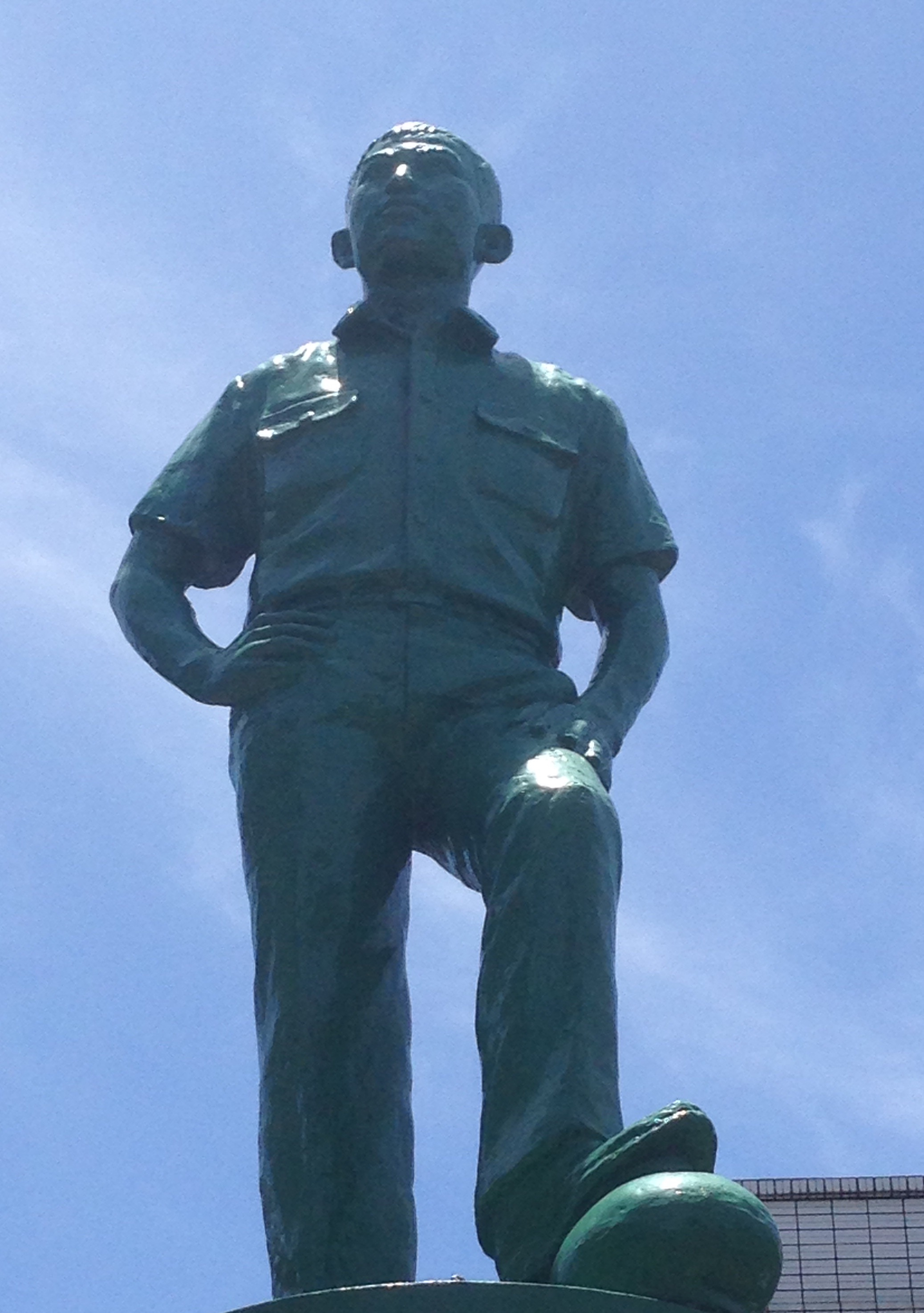 韋君啟銅像